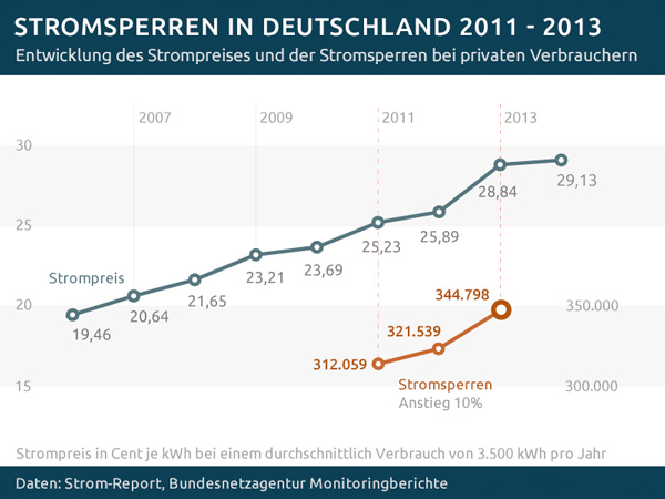 Entwicklung der Stromsperren in Deutschland 2011 - 2013 (CC BY-ND 3.0 DE)